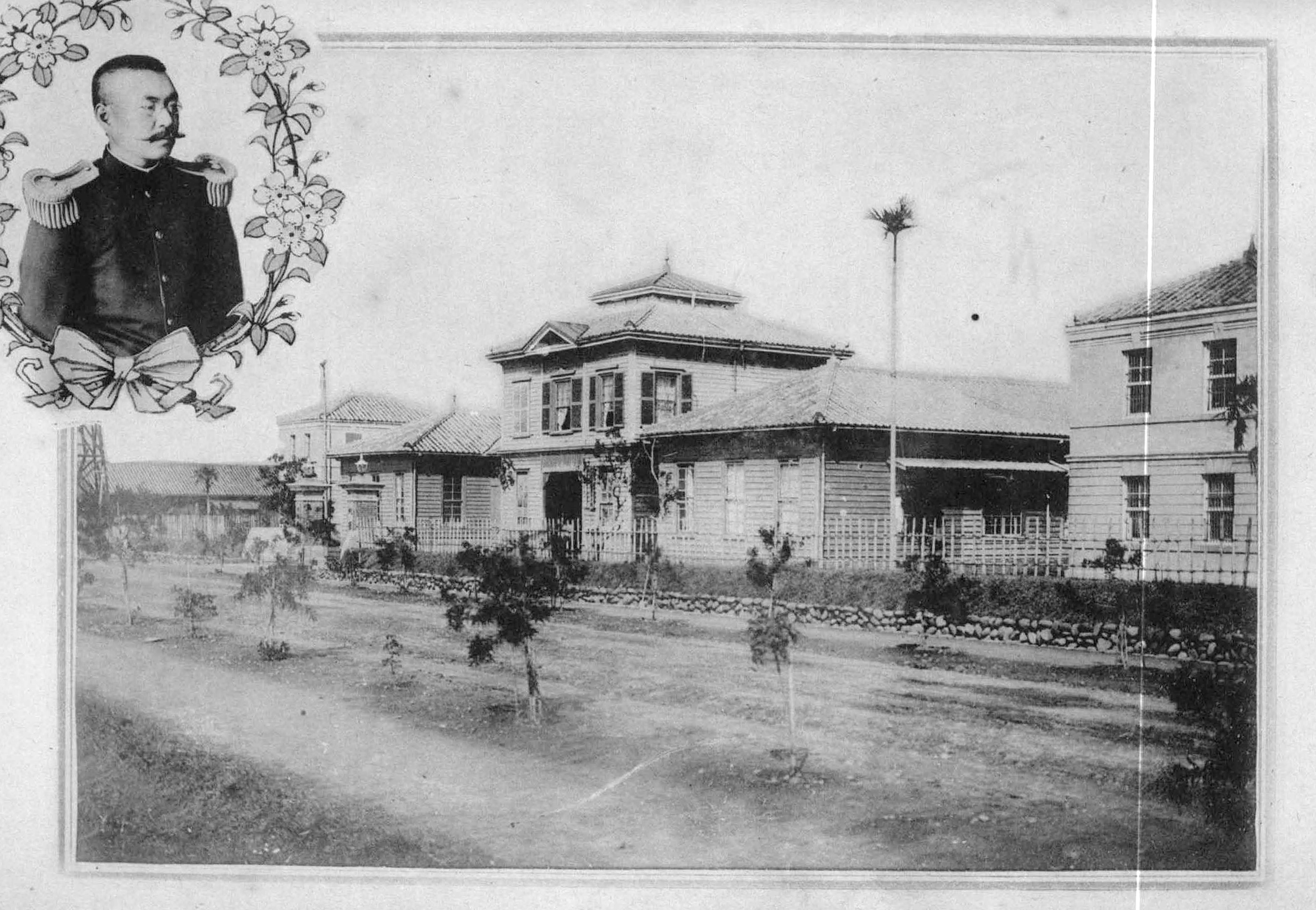 中文（台灣）: 桃園廳廳舍